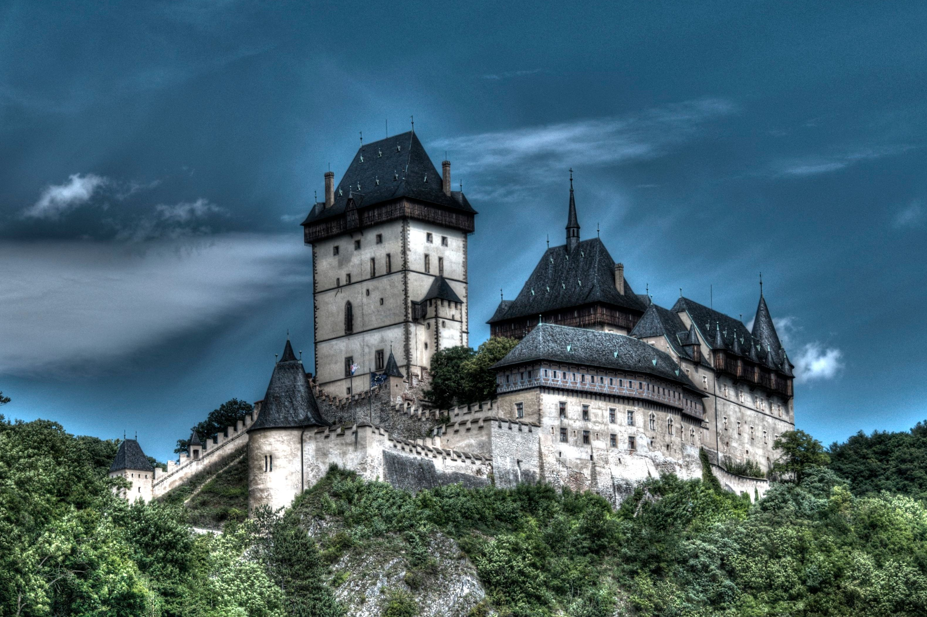 Pohled na hrad z hlavní cesty od jihozápadu